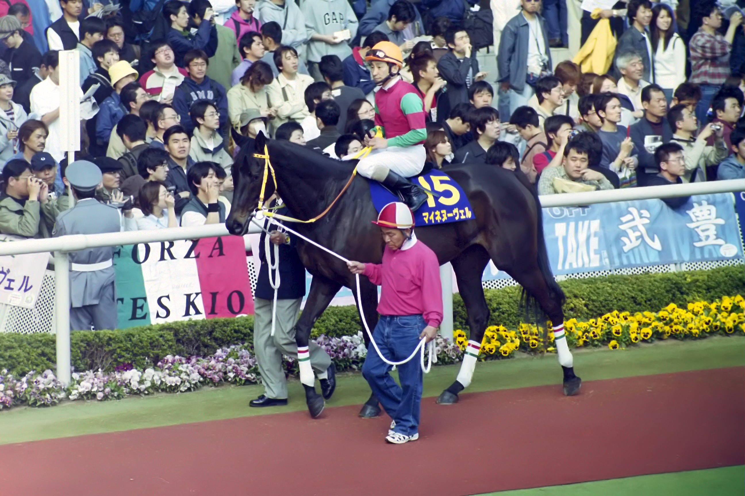 マイネルヌーヴェル号